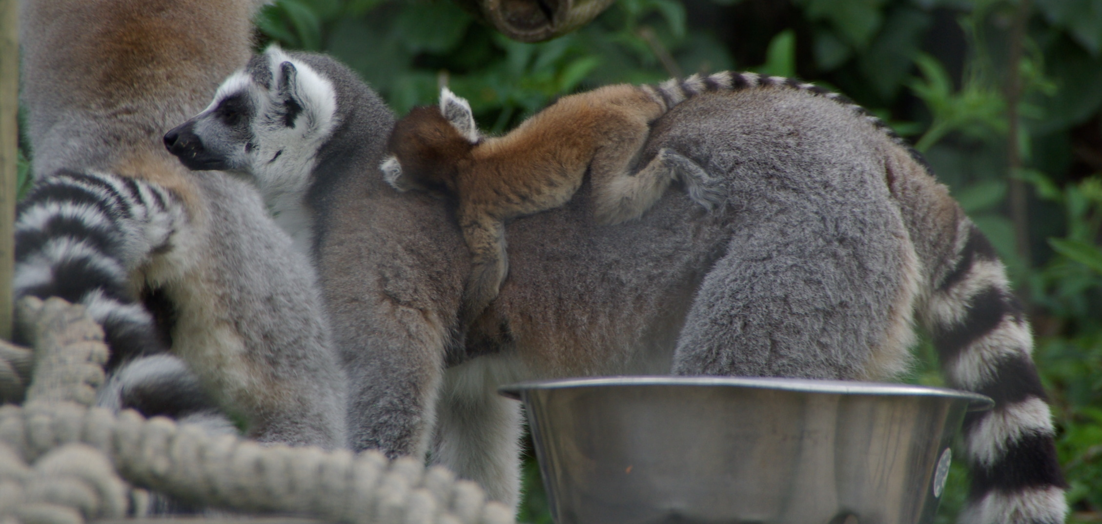 catta